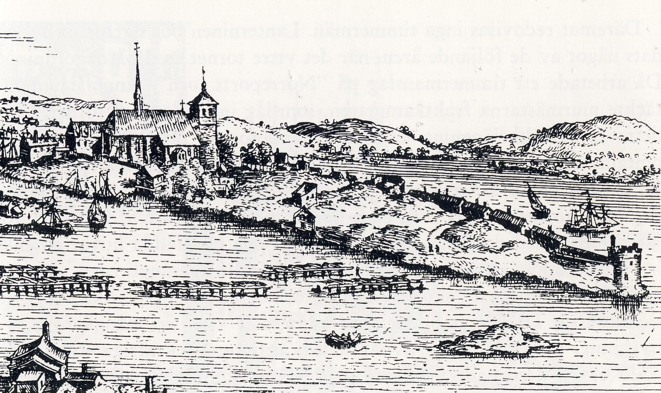 Gråmunkeholmen med Birger jarls torn längs till vänster